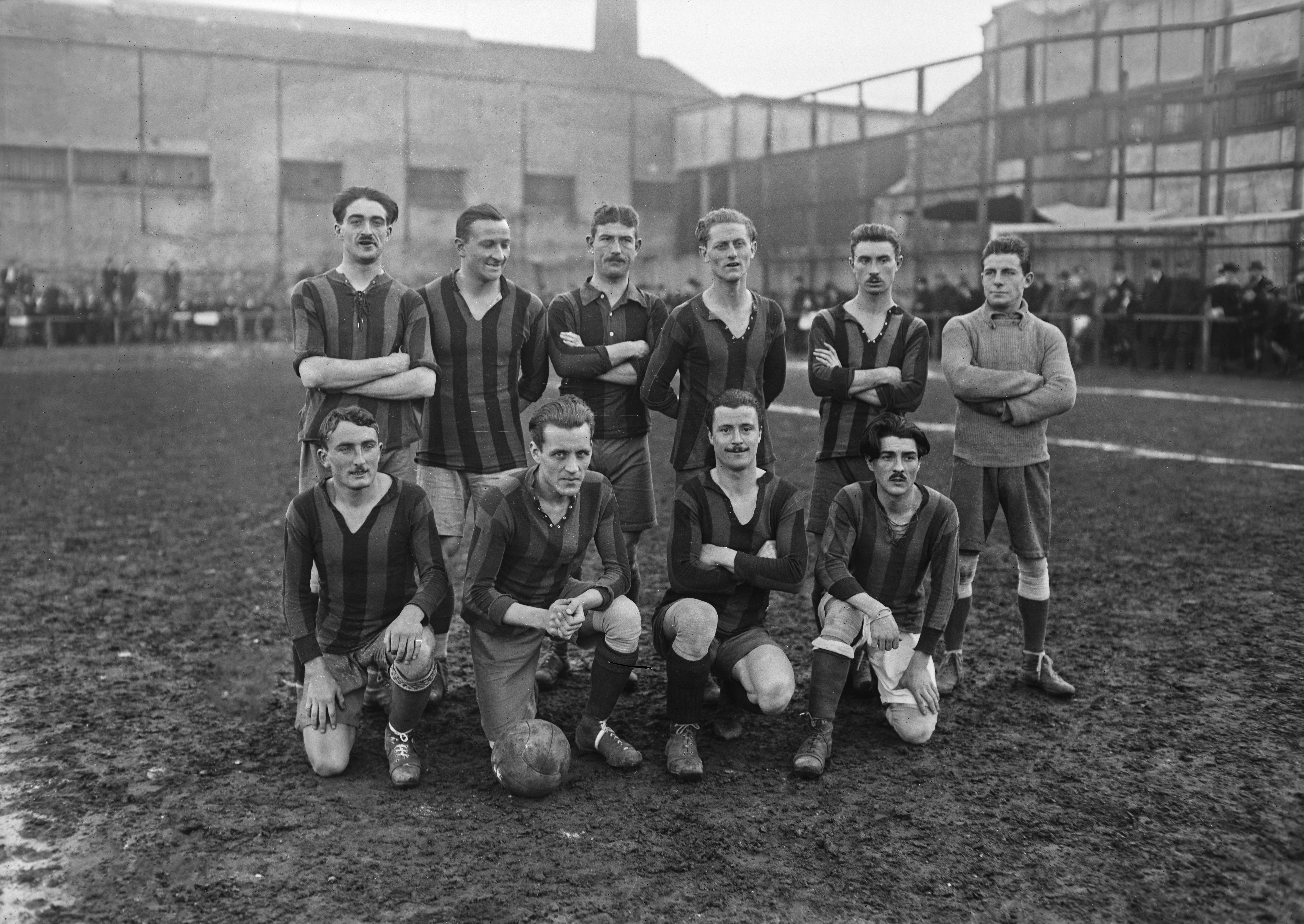 St-Ouen, 21/11/1920, équipe de football du Red Star. Au second rang : Maurice Meyer, Raoul Marion, Lucien Gamblin, François Hugues, Philippe Bonnardel, Megras. Au premier rang : Émile Bourdin, x, Decker, Maurice Thédié.